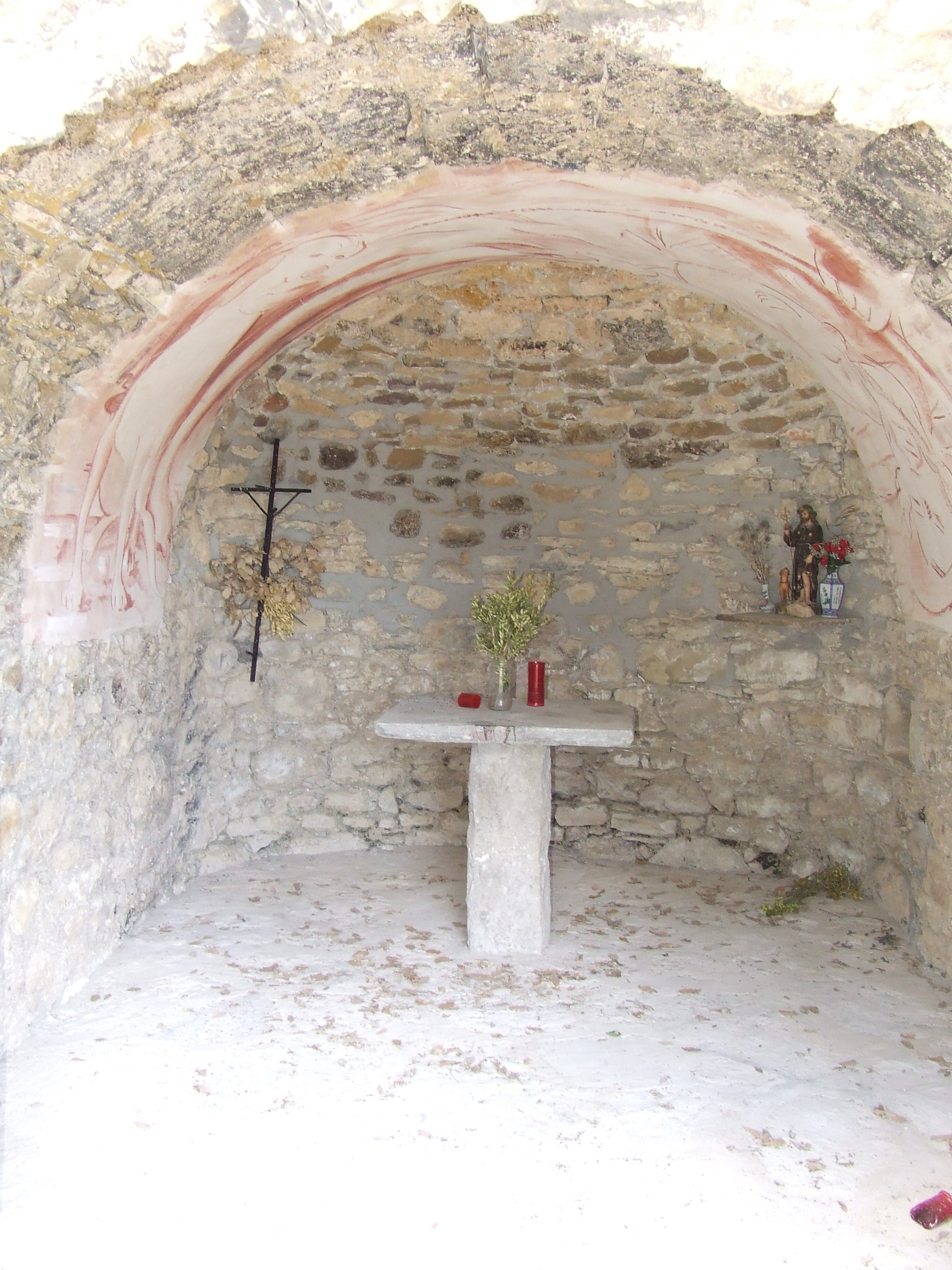 L'absis, a l'interior. Sant Roc de Salàs (Salàs de Pallars, Pallars Jussà)